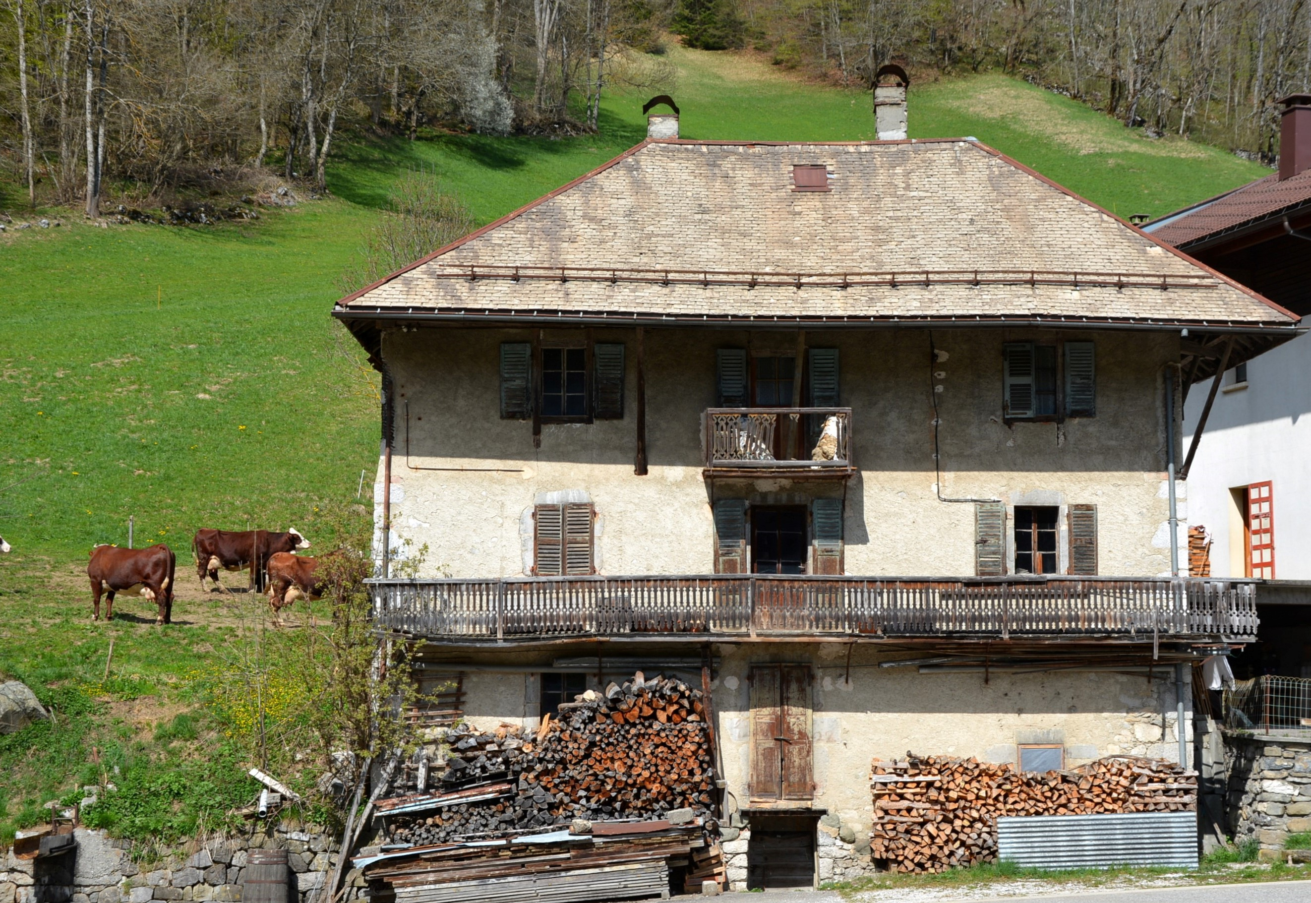 A la limite de la "zone franche", sur la commune de St-Jean-de-Sixt- au bord du CD 12 à l'entrée des "Étroits".